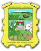 Escudo de armas de Nuevo Morelos Tamaulipas